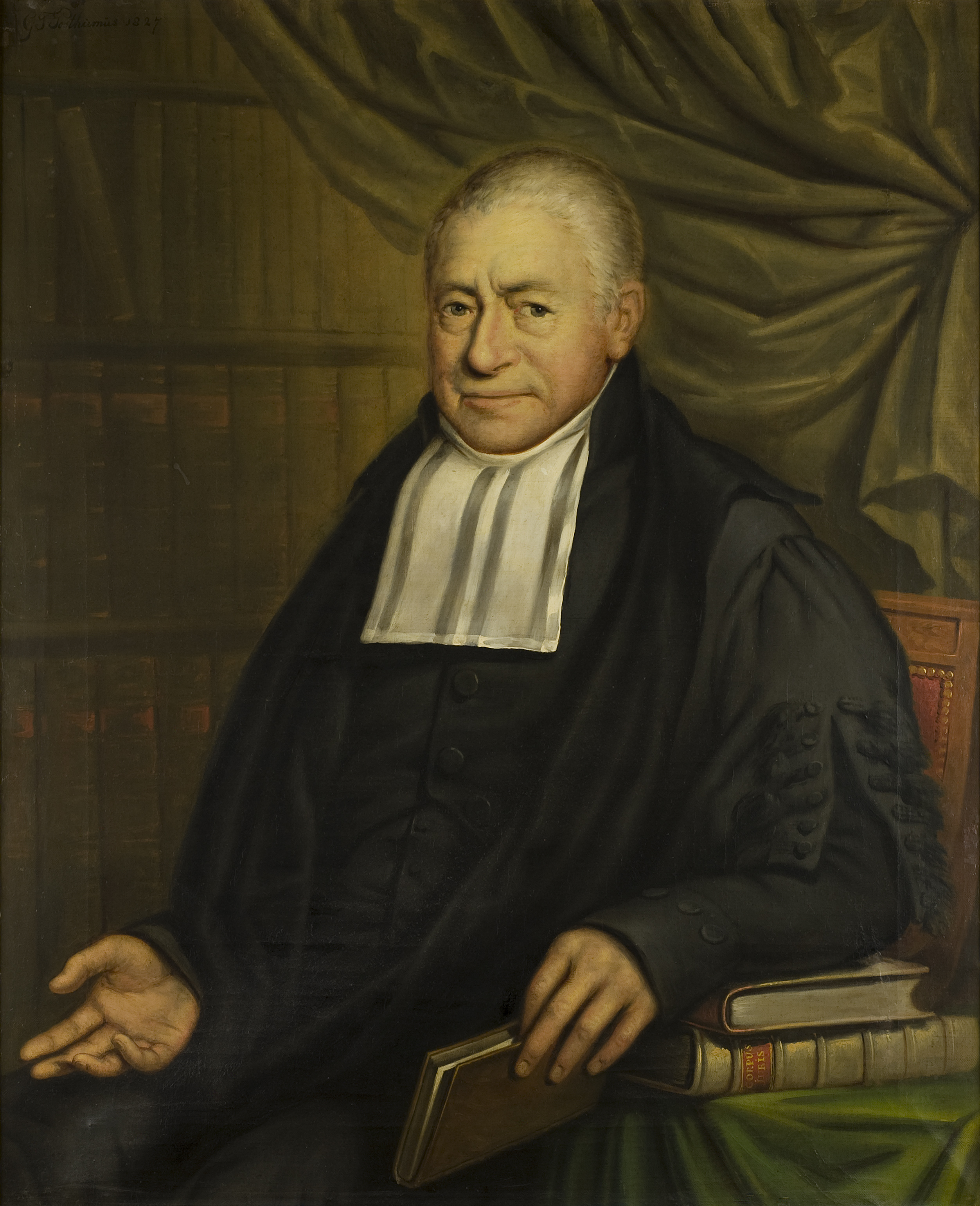 Seerp Gratama. halffiguur naar links, aanziend, zittend in leunstoel,de rechterhand in spreekgebaar, de linkerarm rustend op enige op tafel liggende boeken (waarvan een met rugtitel Corpus Juris), in de linkerhand een boek. toga, bef; grijs haar. op de achtergrond een boekenkast en rechts een opgenomen groenachtig gordijn.